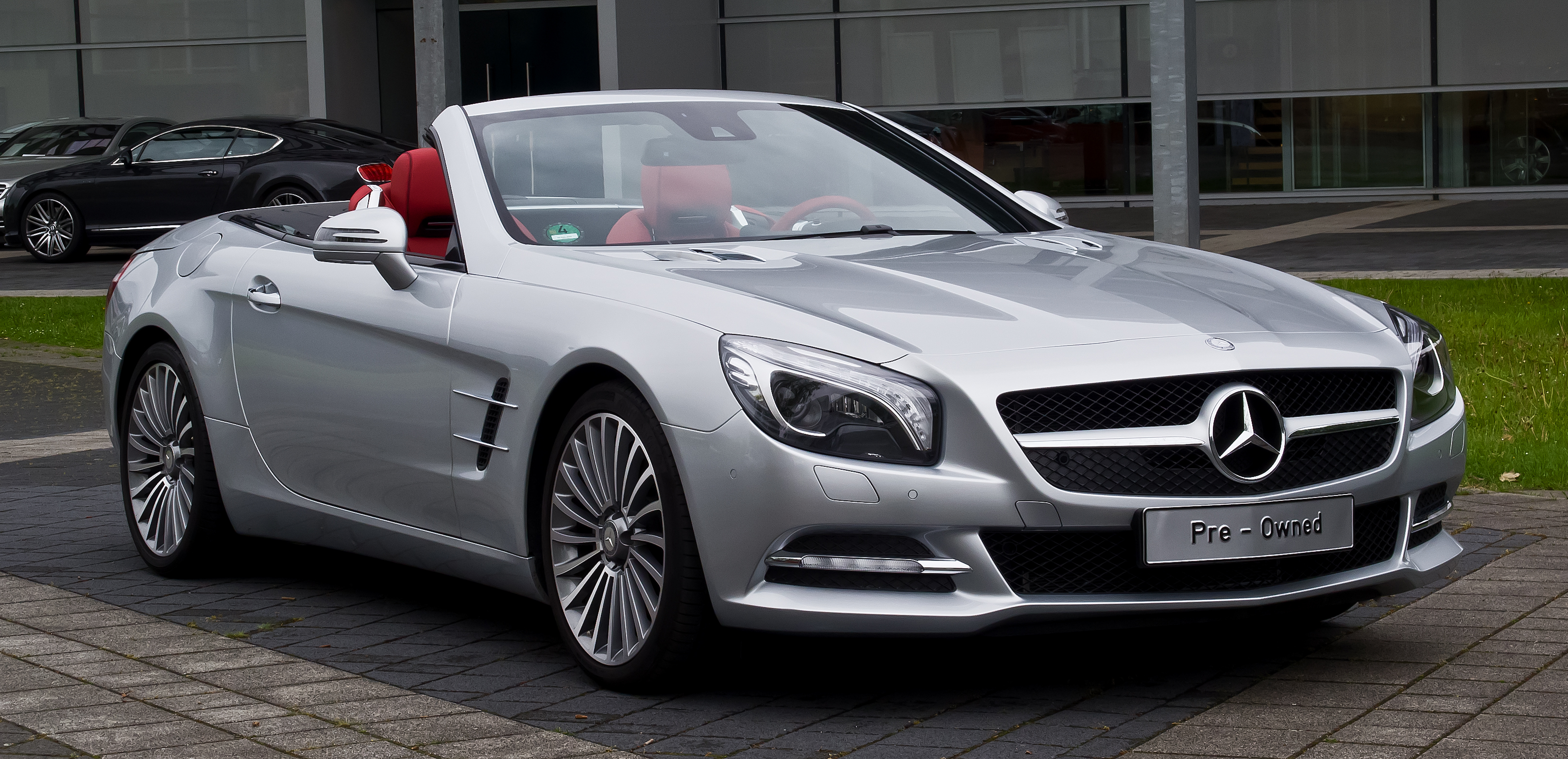 Mercedes-Benz SL 350 (R 231)